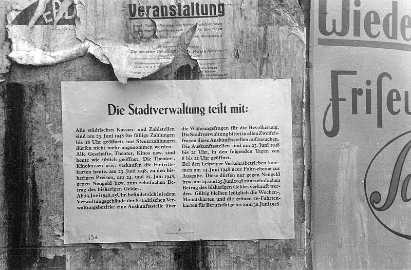 Original image description from the Deutsche FotothekPlakat/ Anschlag zur Währungsreform